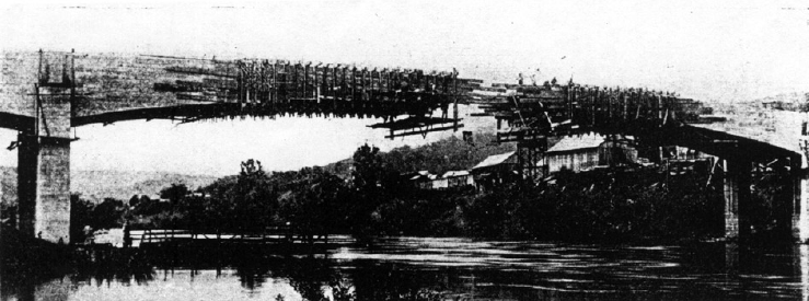 Ponte sobre o Rio do Peixe, entre Herval d'Oeste e Joaçaba/SC,1930. Com vão de 68,5m foi construída totalmente livre de escoras.